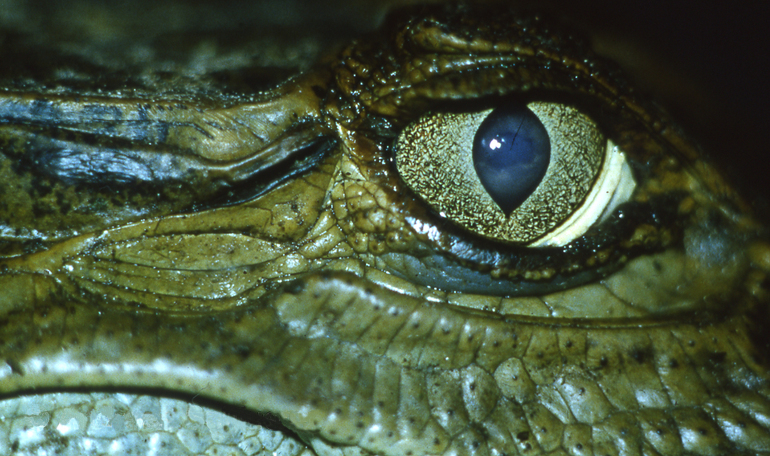 Caiman crocodilus